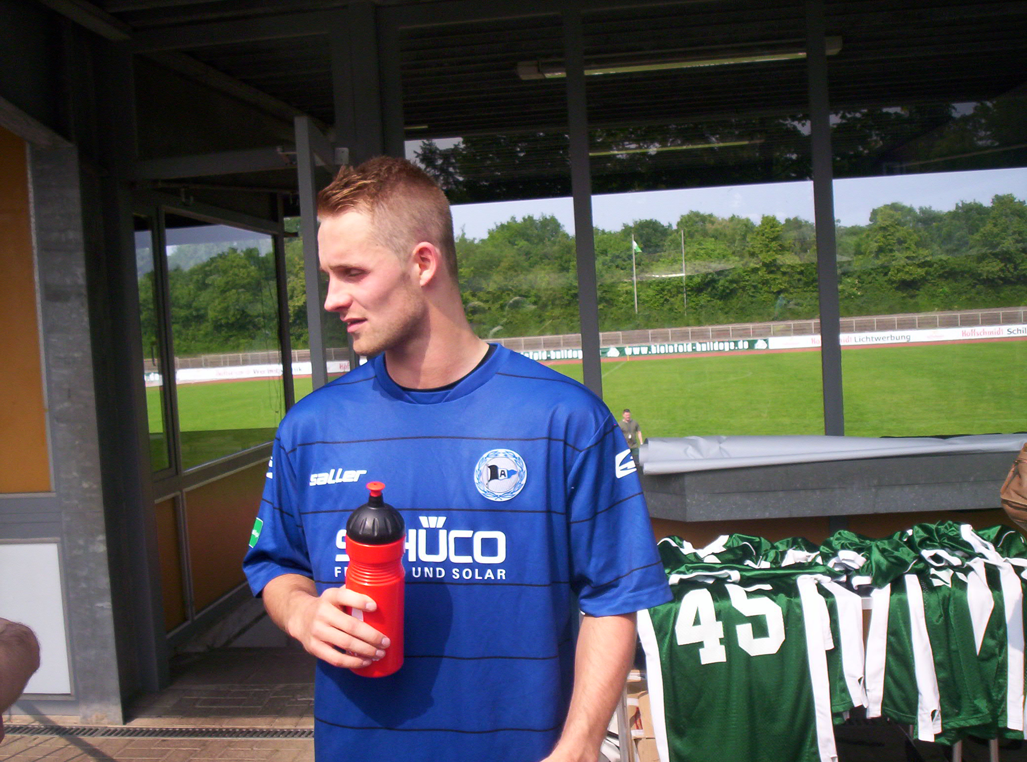 Marwin nach einem Spiel